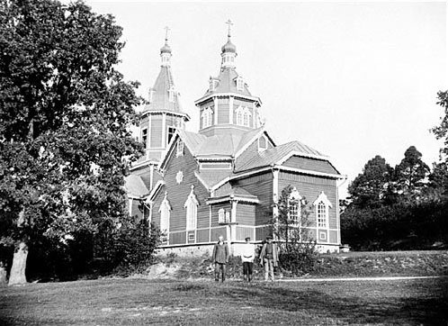 Беларуская (тарашкевіца): Гарадзея (Haradzieja). Царква-мураўёўка